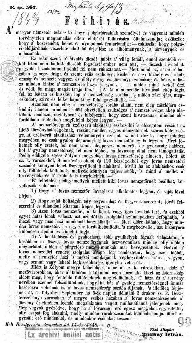 A Borsod megyei nemzetőrség lándzsával való oktatásának szabályaiból